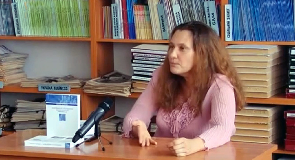 Тетяна Монтян презентувала 17 липня 2014 року в Ужгороді книгу професора Університету Індіани Елінор Остром «Керування спільним», яку вона переклала на українську мову.